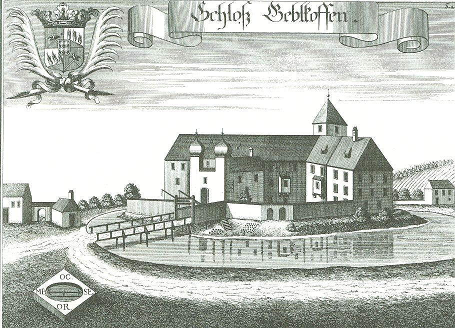 Schloss Gebelkofen nach einem Stich von Michael Wening